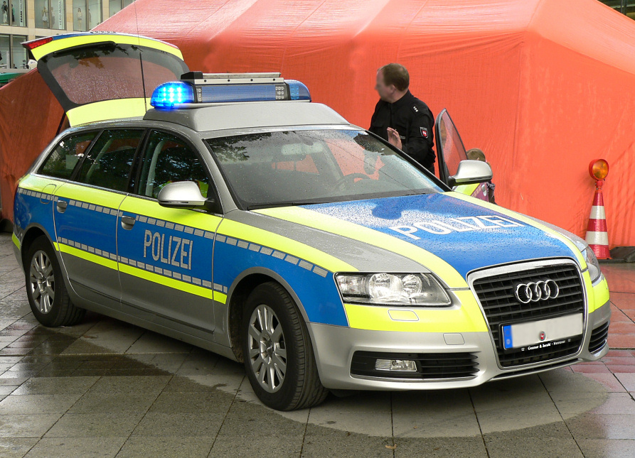 Fahrzeug Autobahnpolizei Niedersachsen, Fotoaufnahme bei Veranstaltung "Polizei erleben" am 04./05.09.2010 in Hannover auf dem Ernst-August-Platz